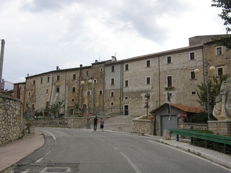 Bisegna